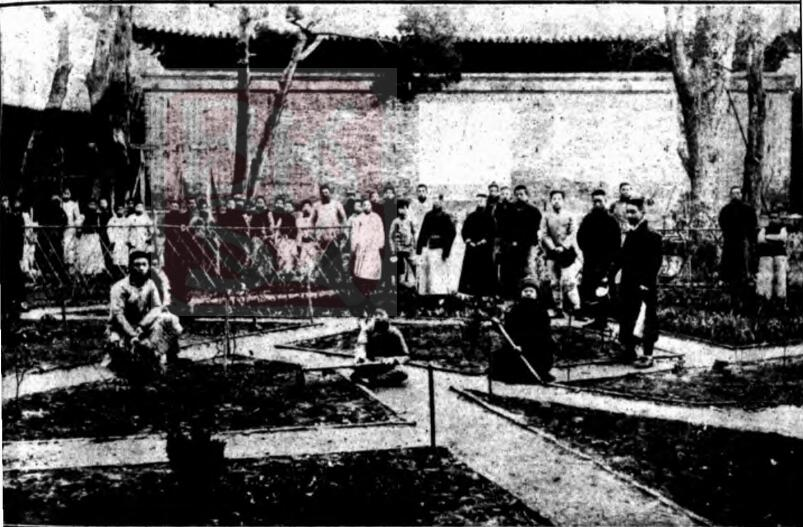 题名： 江都县立高等小学校学校园成立摄影:[照片] 文献来源： 《教育杂志》 出版时间： 1917 年 卷期(页)： [ 第9卷 第10期 ，1页 ] 中图分类号： G529.6